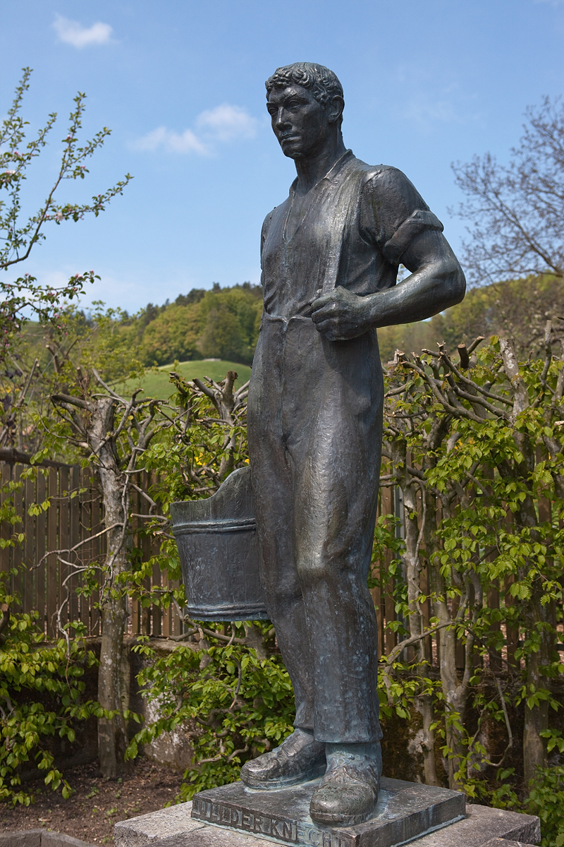 Brunnen mit Ueli dem Knecht, nach dem Roman von Jeremias Gotthelf. Bronze, 210 cm hoch. Bildhauer: Arnold Huggler, 1942